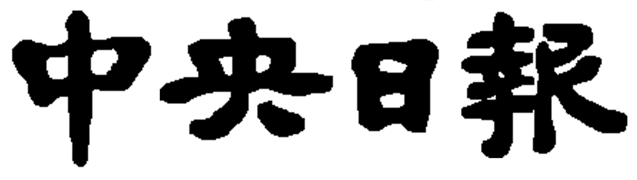 중앙일보 가로판 로고 (1965년부터 1995년까지 한자 사용)